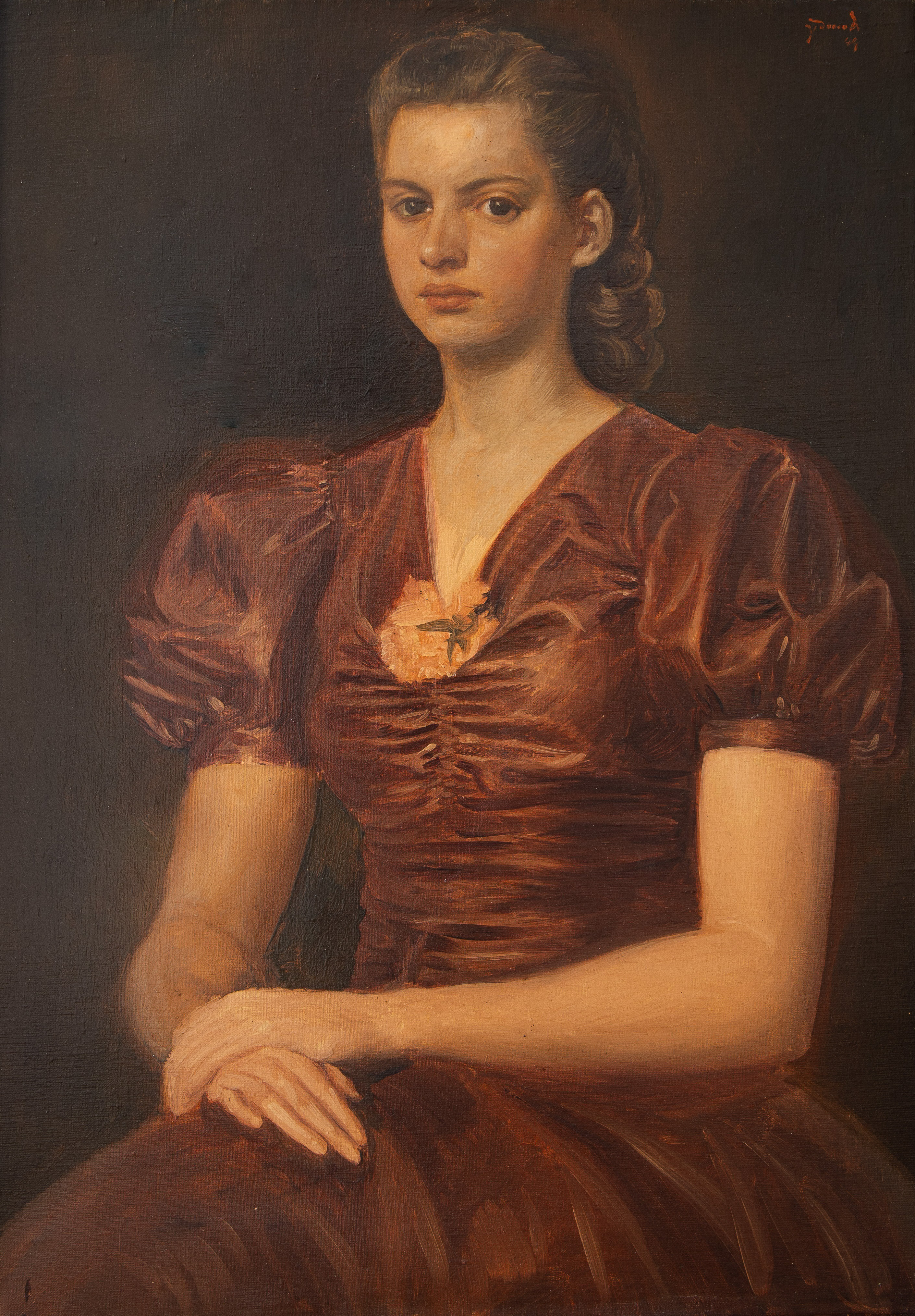 Portret van de verloofde van de kunstenaar